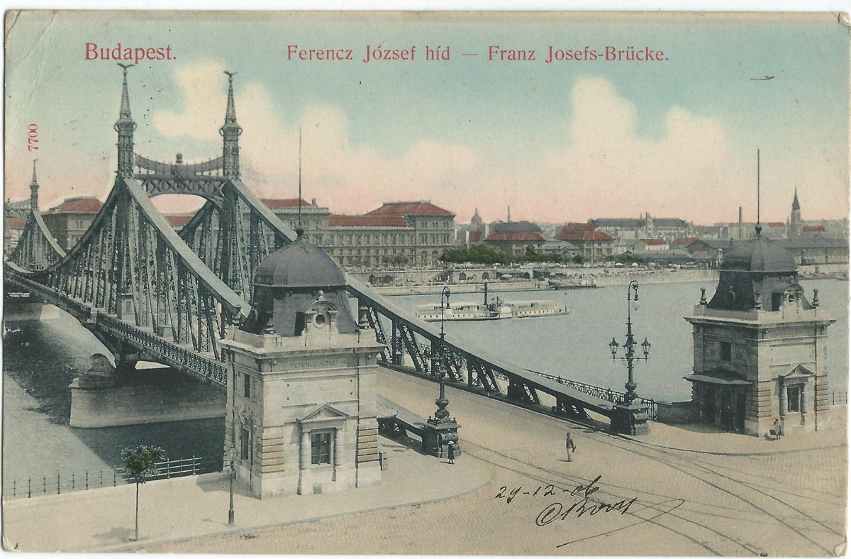 Vue de Budapest au début du XXe siècle.